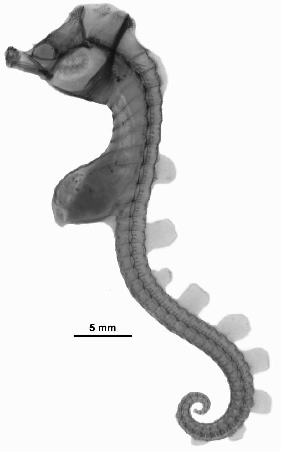 Rayos X de Hippocampus paradoxus por Martin Gomon / Museum Victoria.